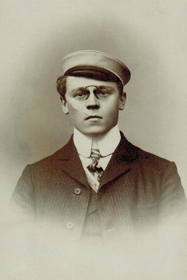 Porträtfotografie von Emil Schwamberger als Student in Tübingen